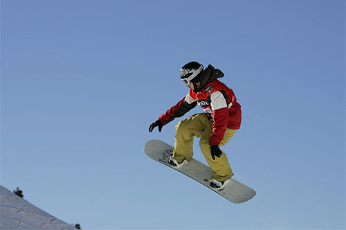 Leysin: "Champs open" im Nescafé Freestyle Park